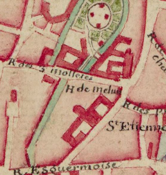 Hôtel de Melun sur plan 18è. Emplacement de la future rue Masurel